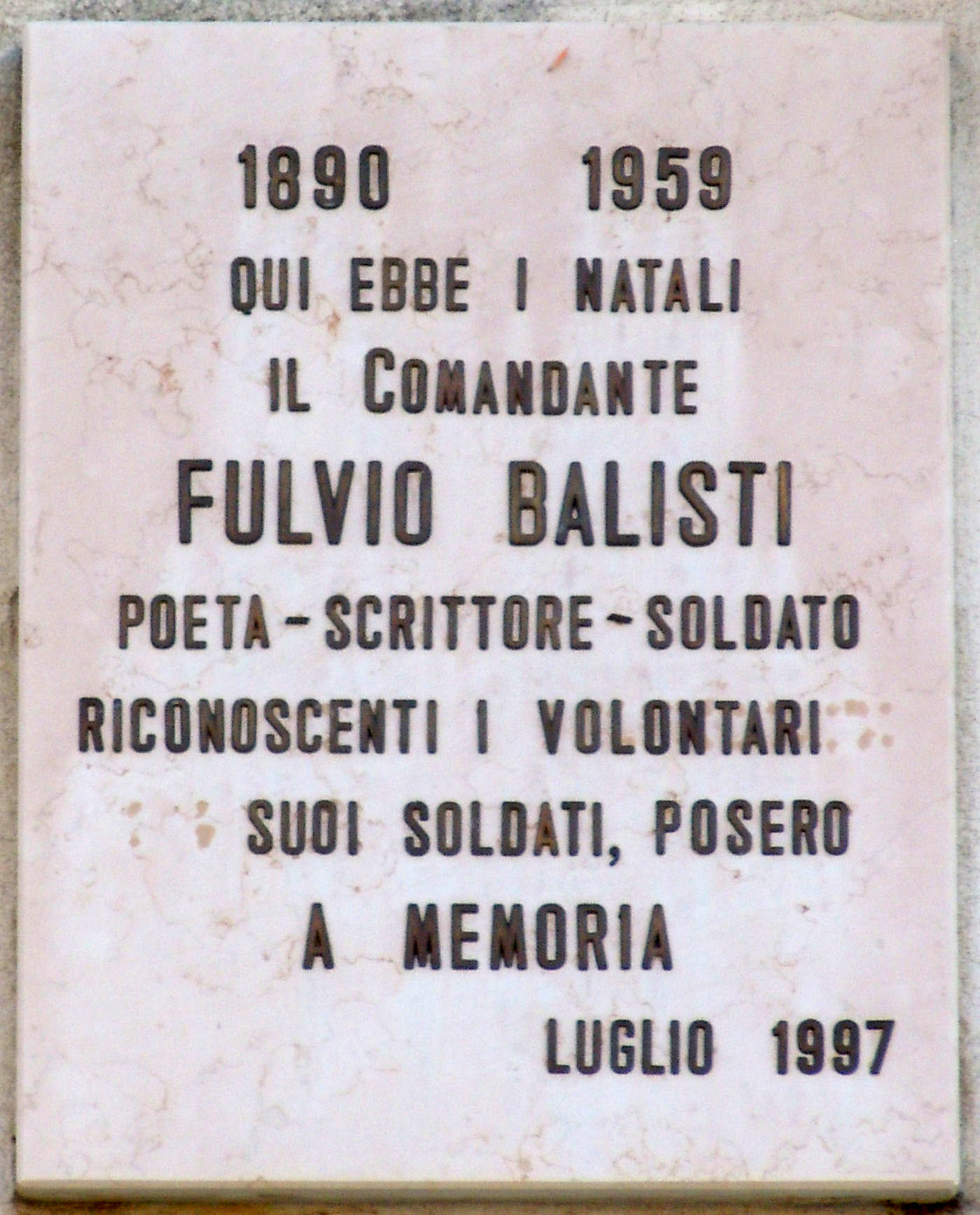 Ponti sul Mincio, lapide a Fulvio Balisti.